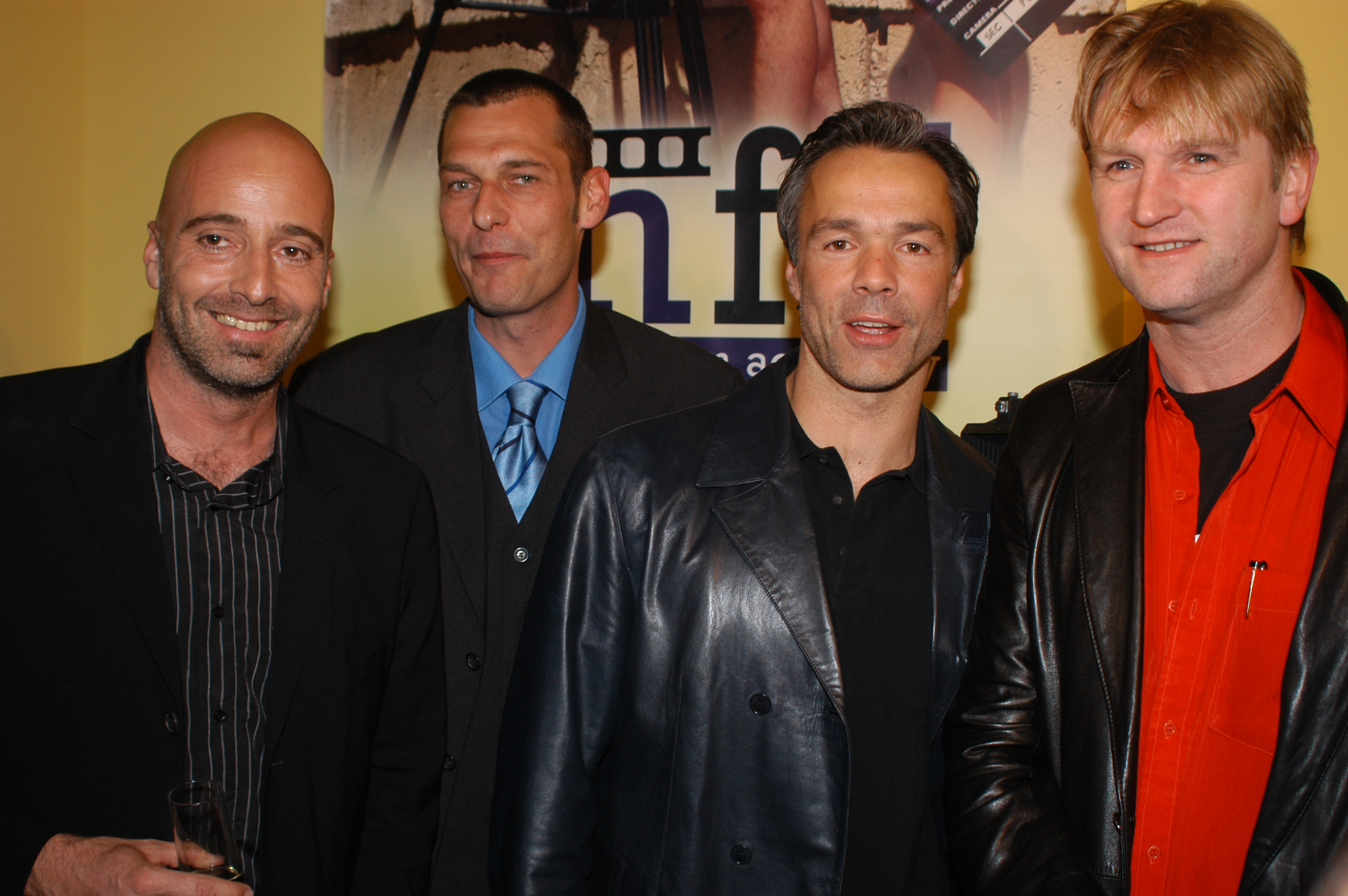 Michael W. Driesch, Lou Binder, Hannes Jaenicke und Detlev Buck (v. l. n. r.) bei der Eröffnung der Mallorca Film Academy im März 2004.